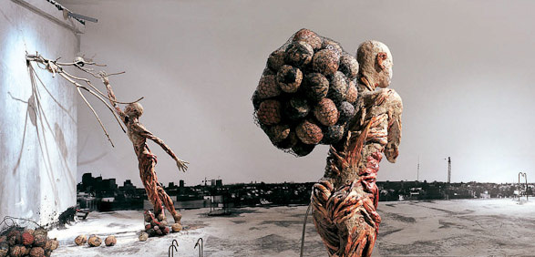 installation